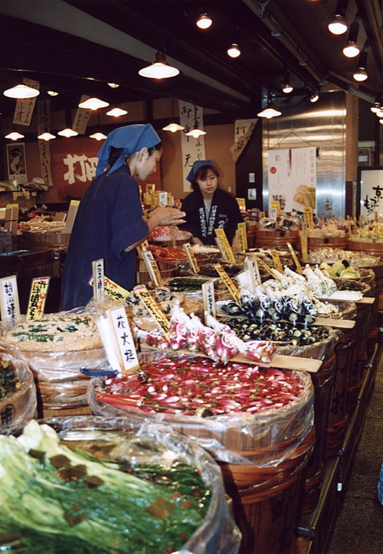 漬物屋（京都・中京区錦小路通柳馬場西入ル中魚屋町484、錦市場の漬物屋「打田漬物」[1]錦小路店[2]）AA_VavHoutte-5081_015A.JPG